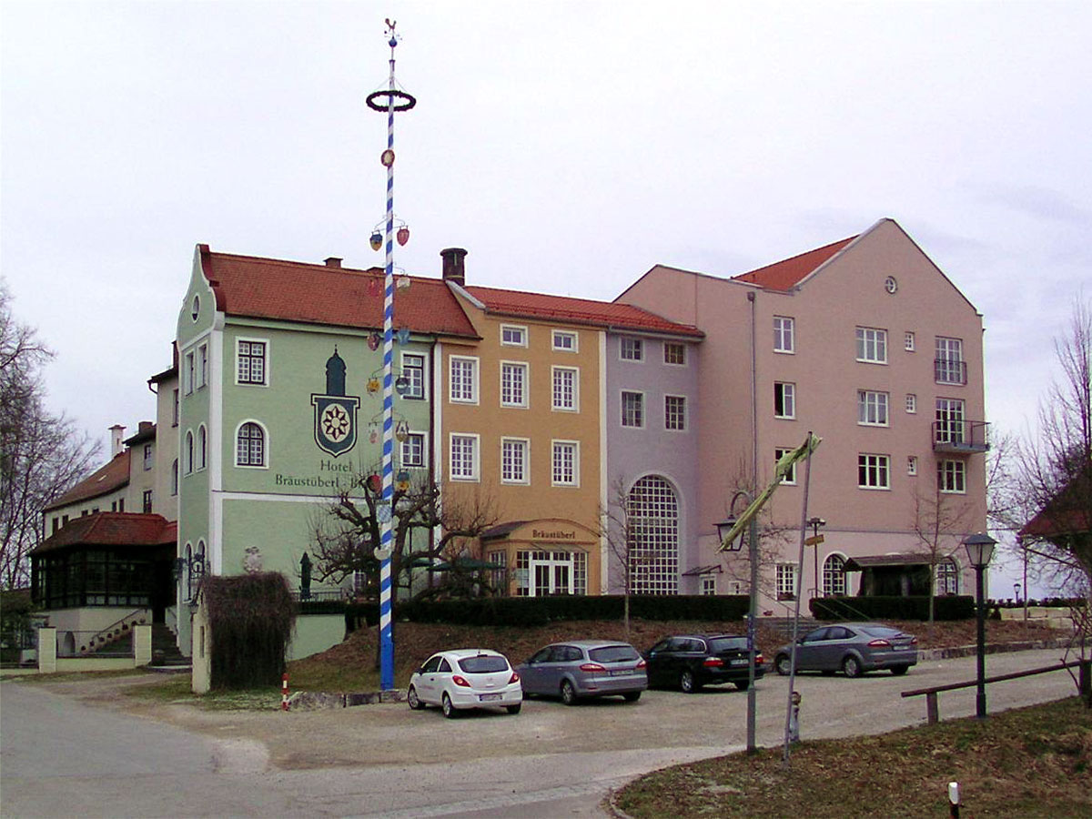 Neues Schloss in Odelzhausen mit Bräustübl, Brauerei und Hotel.